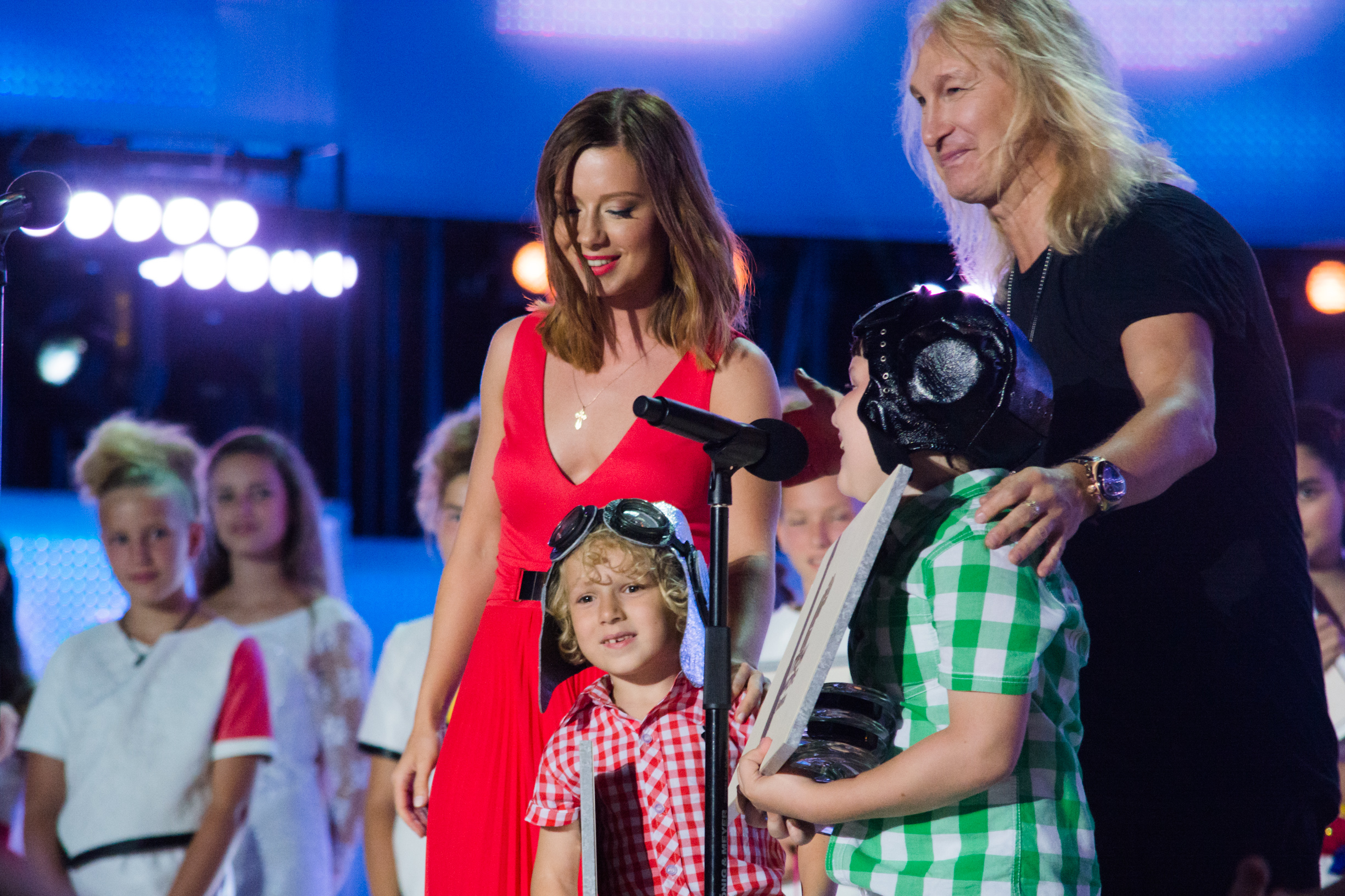 Дуэт Дикие Гитары на Детской Новой волне 2015